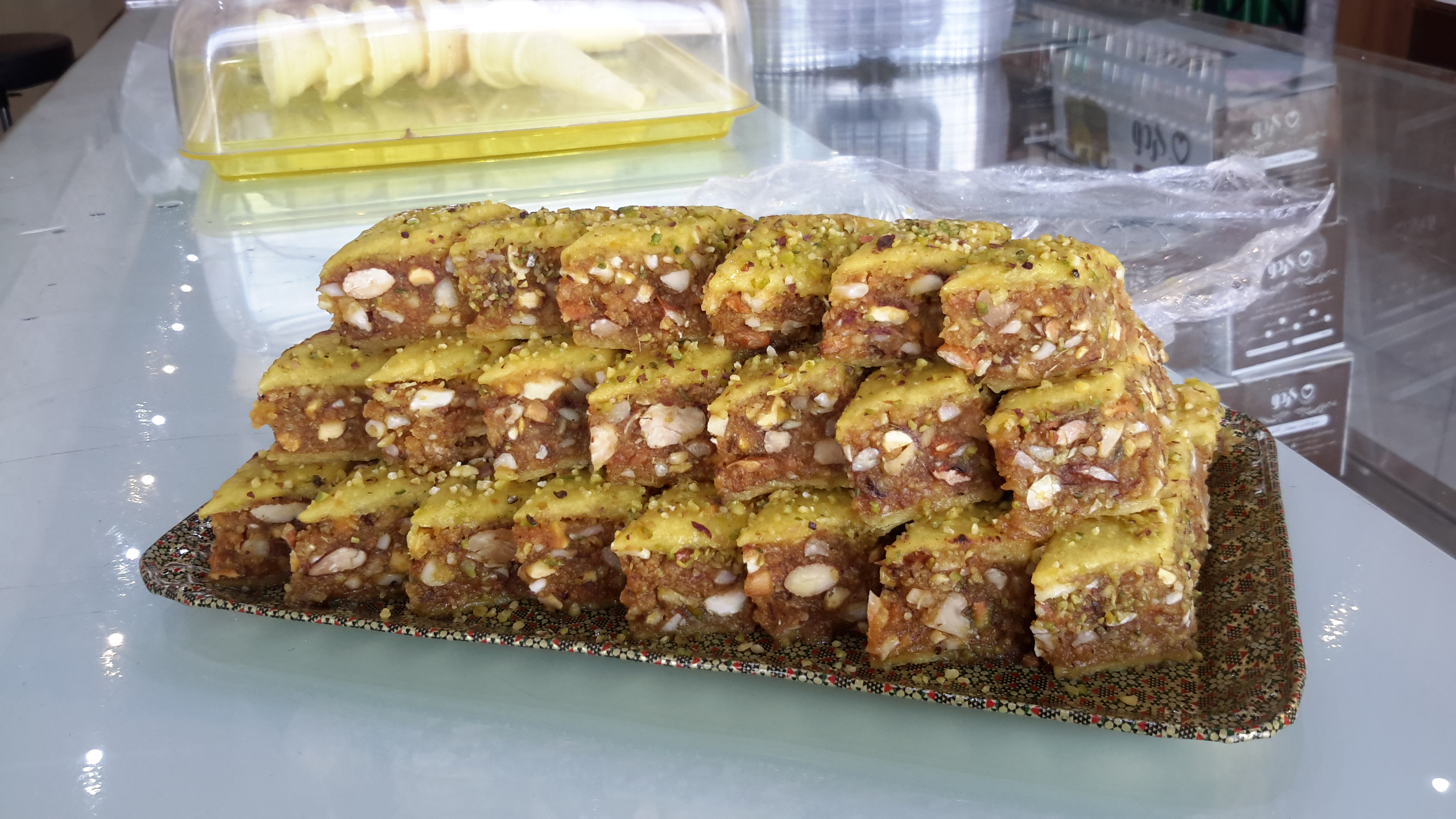 باقلوا سنتی کاشان اصیل 5 مغز 70 درصد